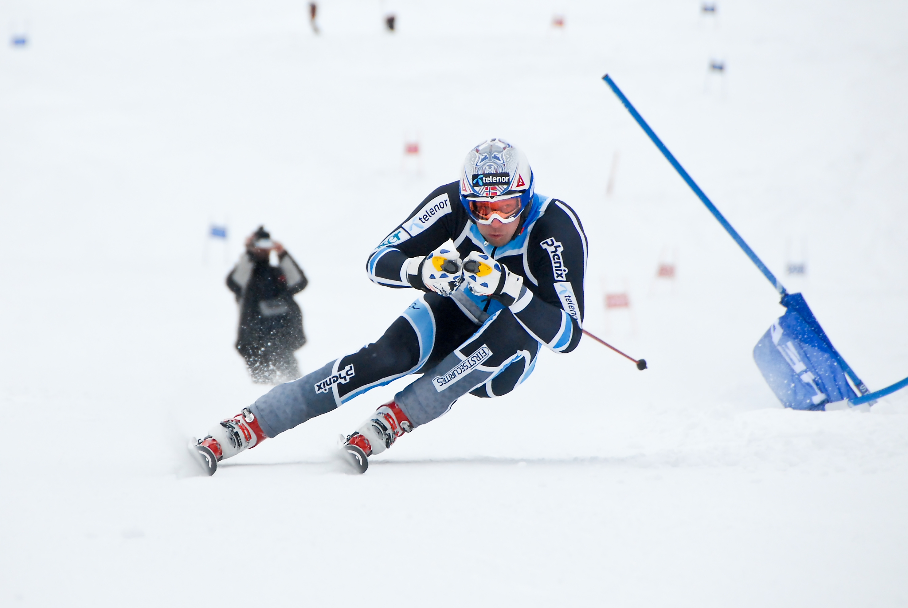 Aksel Lund Svindal trener i Høgegga Renn- og Treningssenter i Trysil. Foto: Ola Matsson